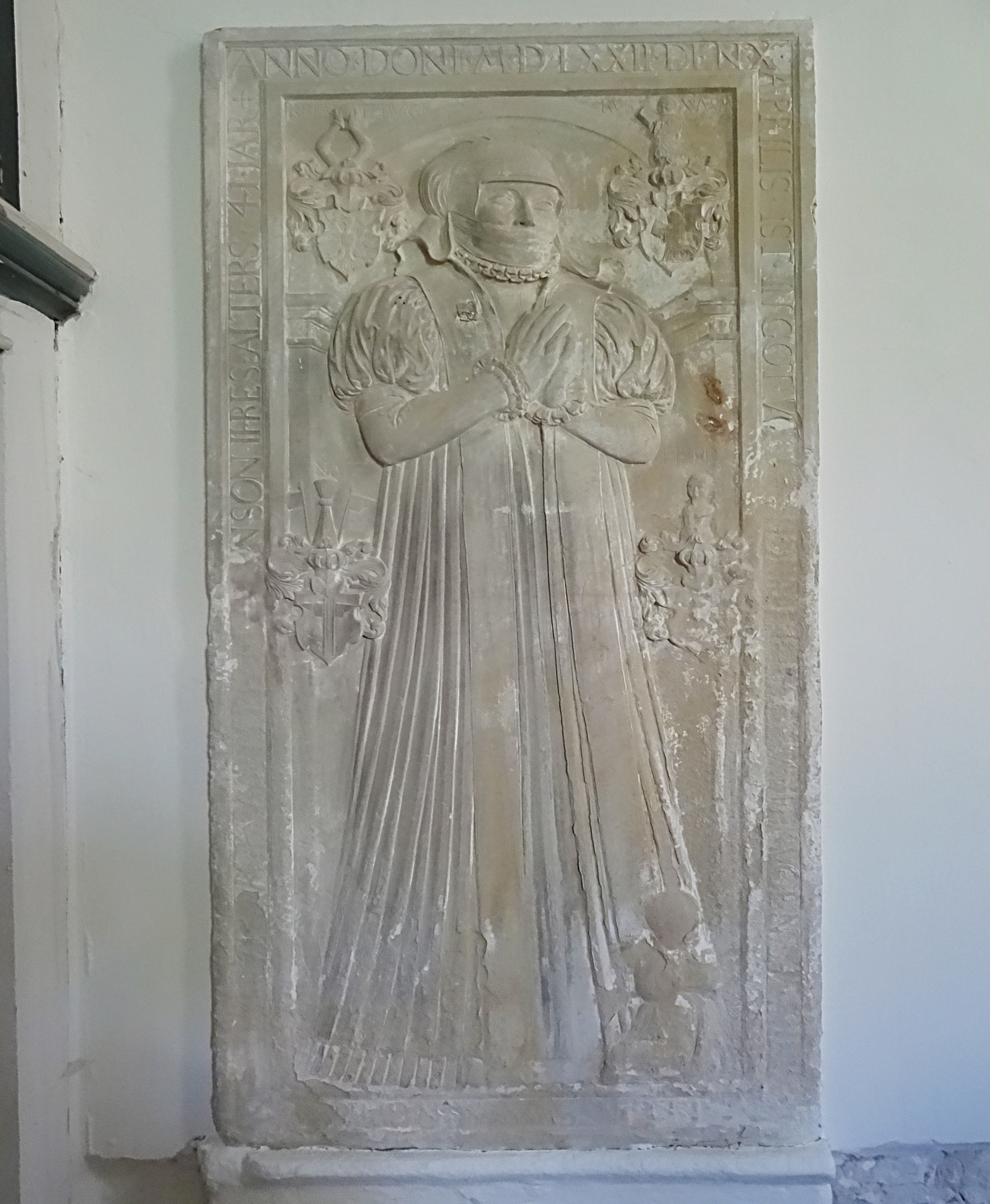 Grabplatte einer Frau von der Wachsenburg in der Dreifaltigkeitskirche Holzhausen von 1572